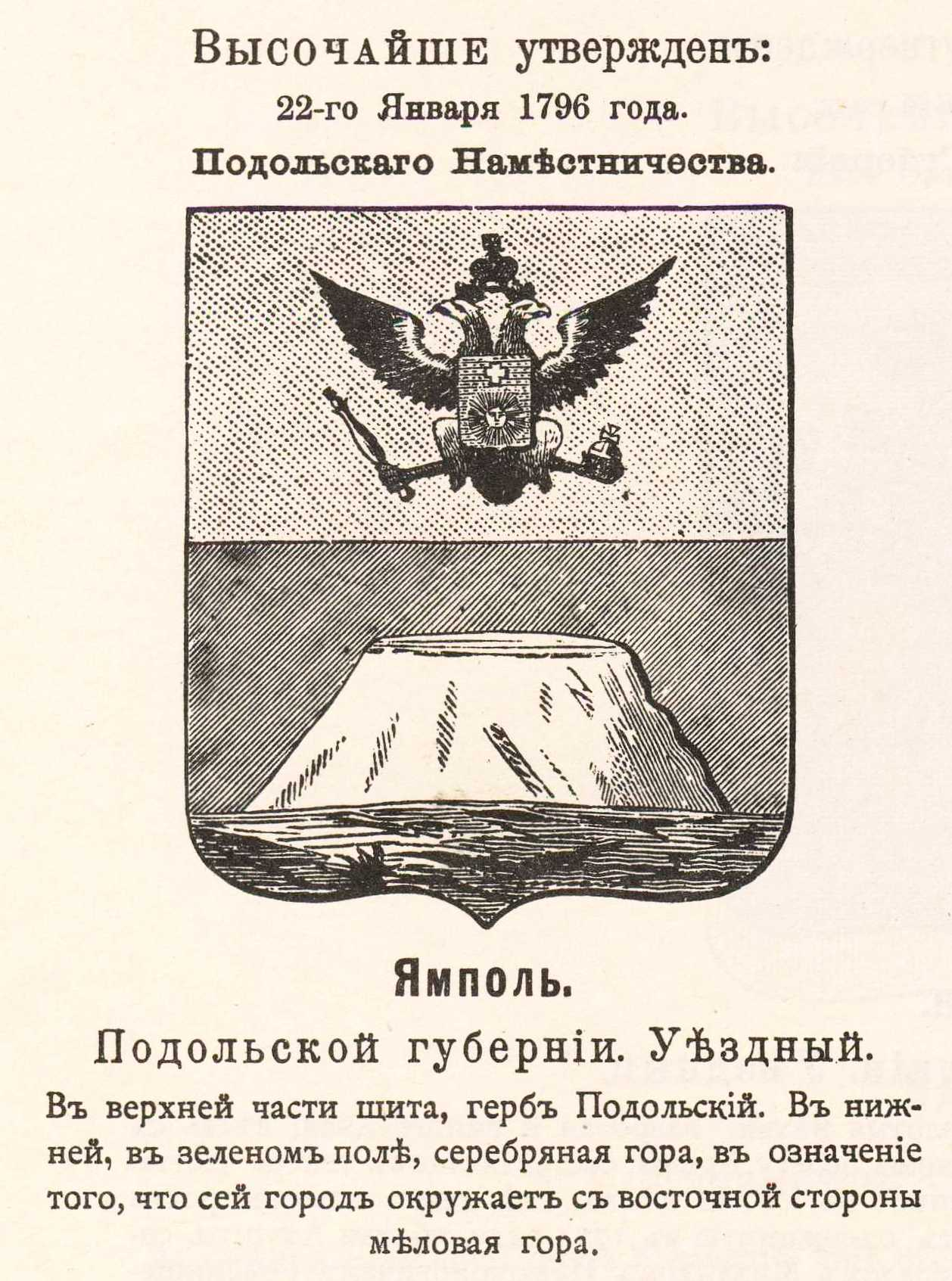 Official Russian Empire coat of arm. Герб Российской Империи уездного города Ямполь Подольской губернии с официальным описанием в Гербовнике Винклера.